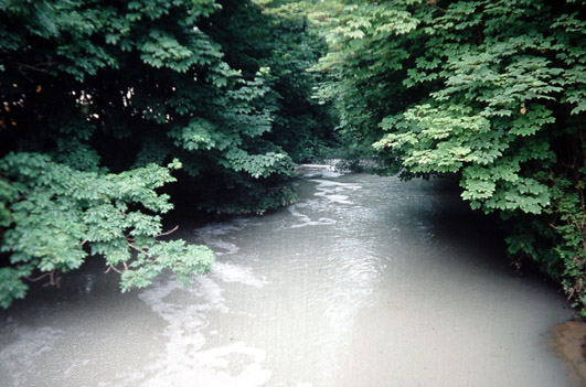 En aval des usines à papier de Lumbres et Wizernes, des pollutions épisodiques (de plusieurs heures souvent) blanchissaient la rivière, la couleur blanche étant probablement due à du Dioxyde de titane.